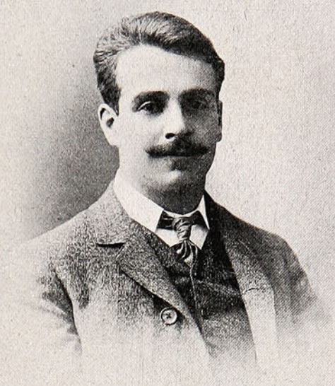 Enrique Zañartu Prieto, (Santiago, 25 de diciembre de 1881 - 8 de febrero de 1943), fue un político chileno. Sobre todo conocido por ser el instigador del incendio del local de la FECH en 1920.